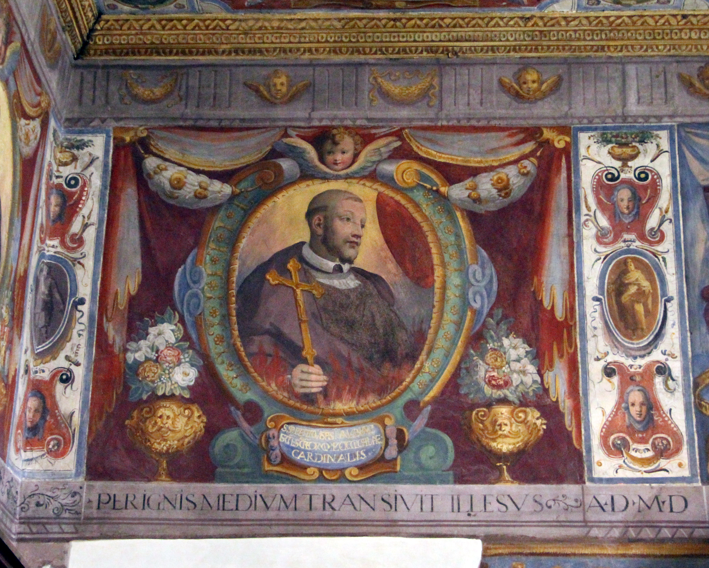 San Bartolomeo a Ripoli